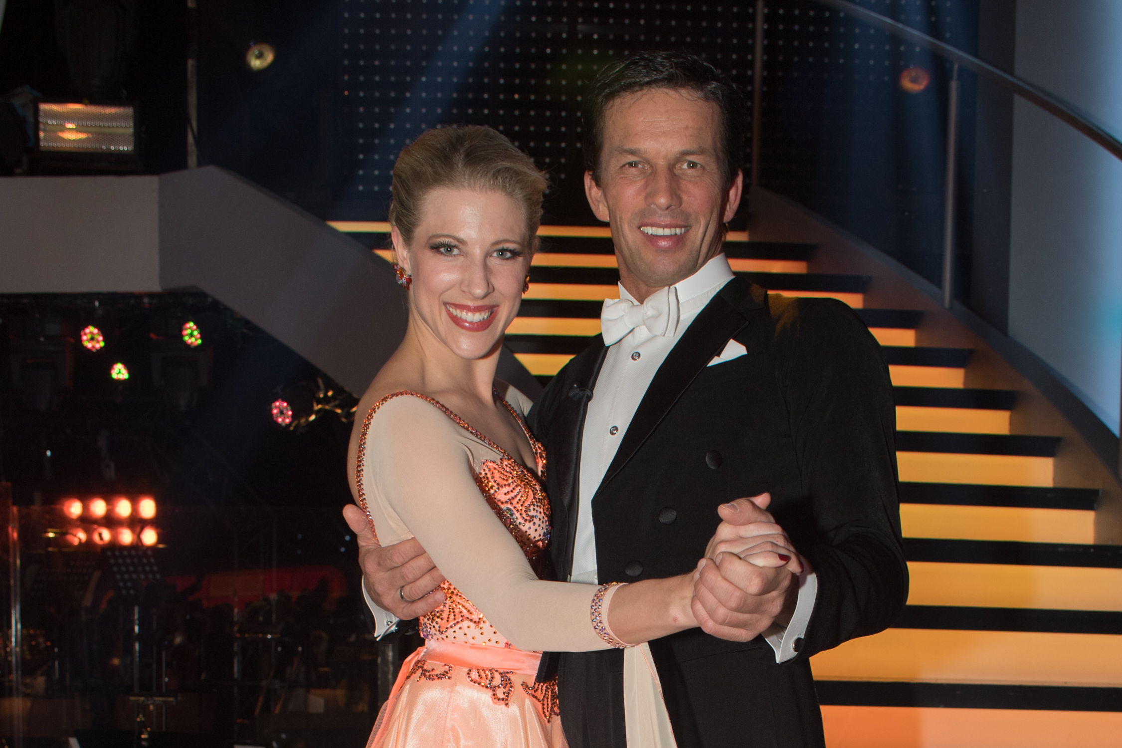 ORF Dancing Stars am 31. März 2017. Bild zeigt Maria Santner und Martin Ferdiny.